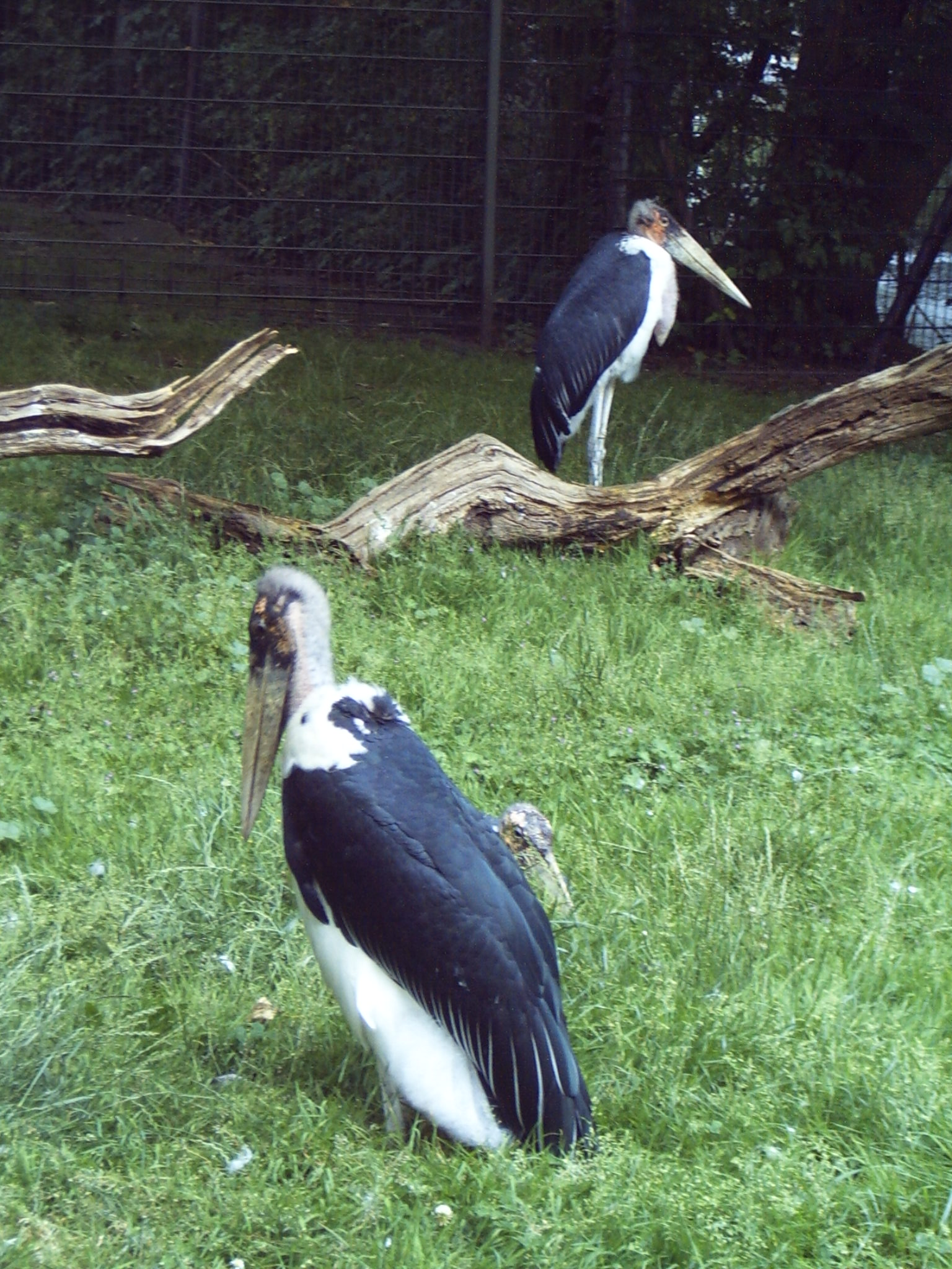 Marabus (Leptoptilos crumeniferus) at Cologne Zoo